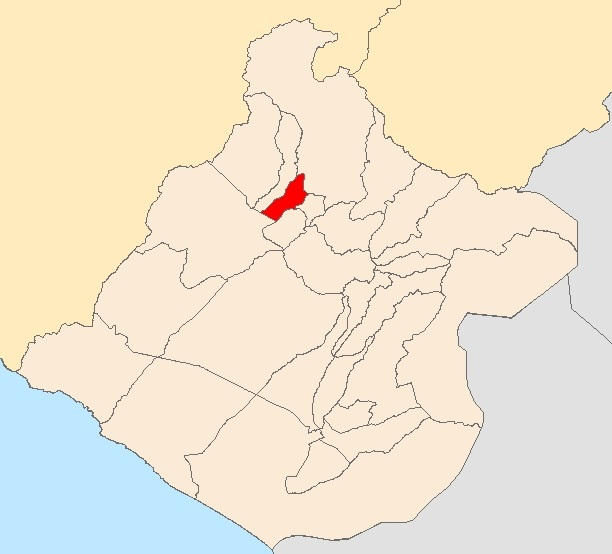 Mapa distrito Huanuara,Tacna - Perú